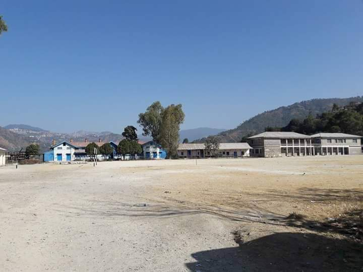 राजकीय आदर्श वरिष्ठ माध्यमिक विद्यालय जुनगा